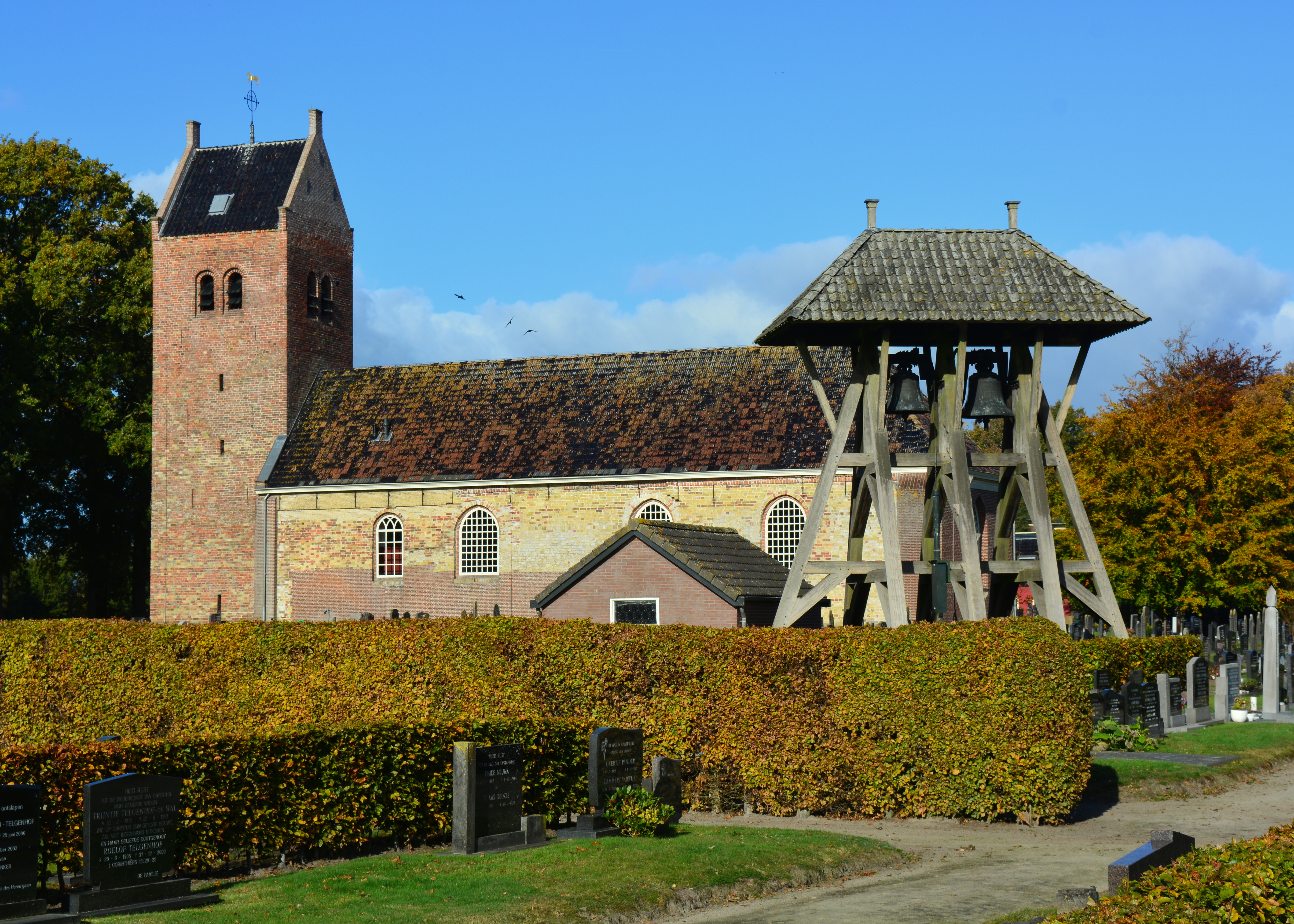 Ureterp, Petruskerk